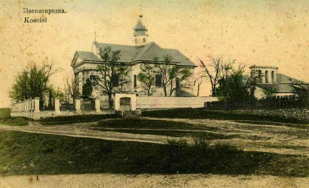 Kościół katolicki z 1800 roku w m. Zwinogródka na fotografii z 1892 r.